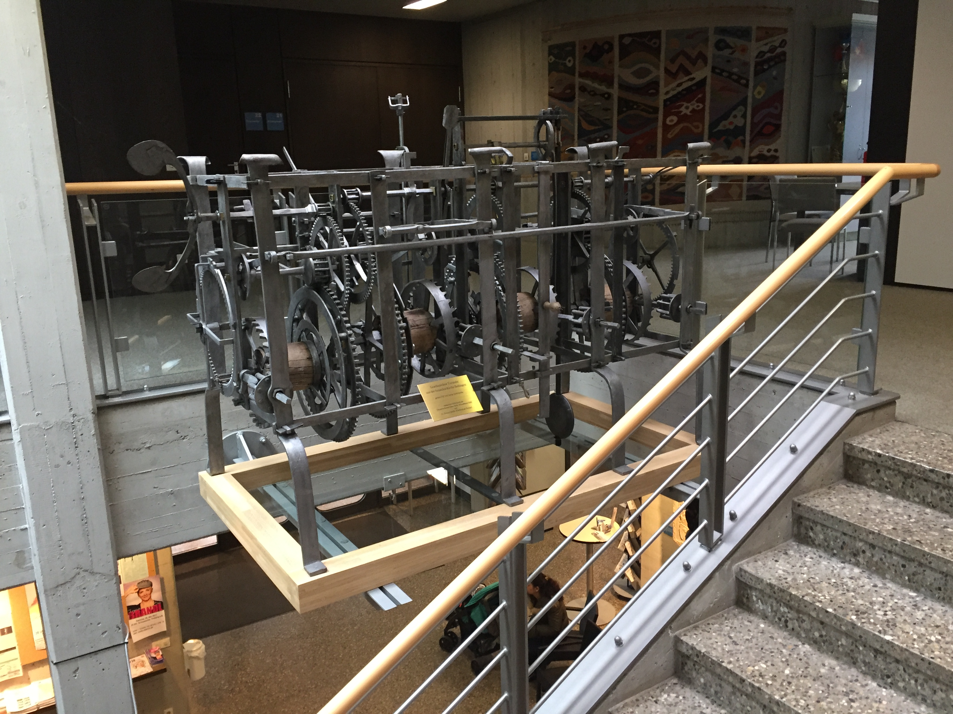 Uhrwerk der Amanduskirche Freiberg am Neckar, anlässlich der Restaurierung ausgestellt im Rathaus der Stadt